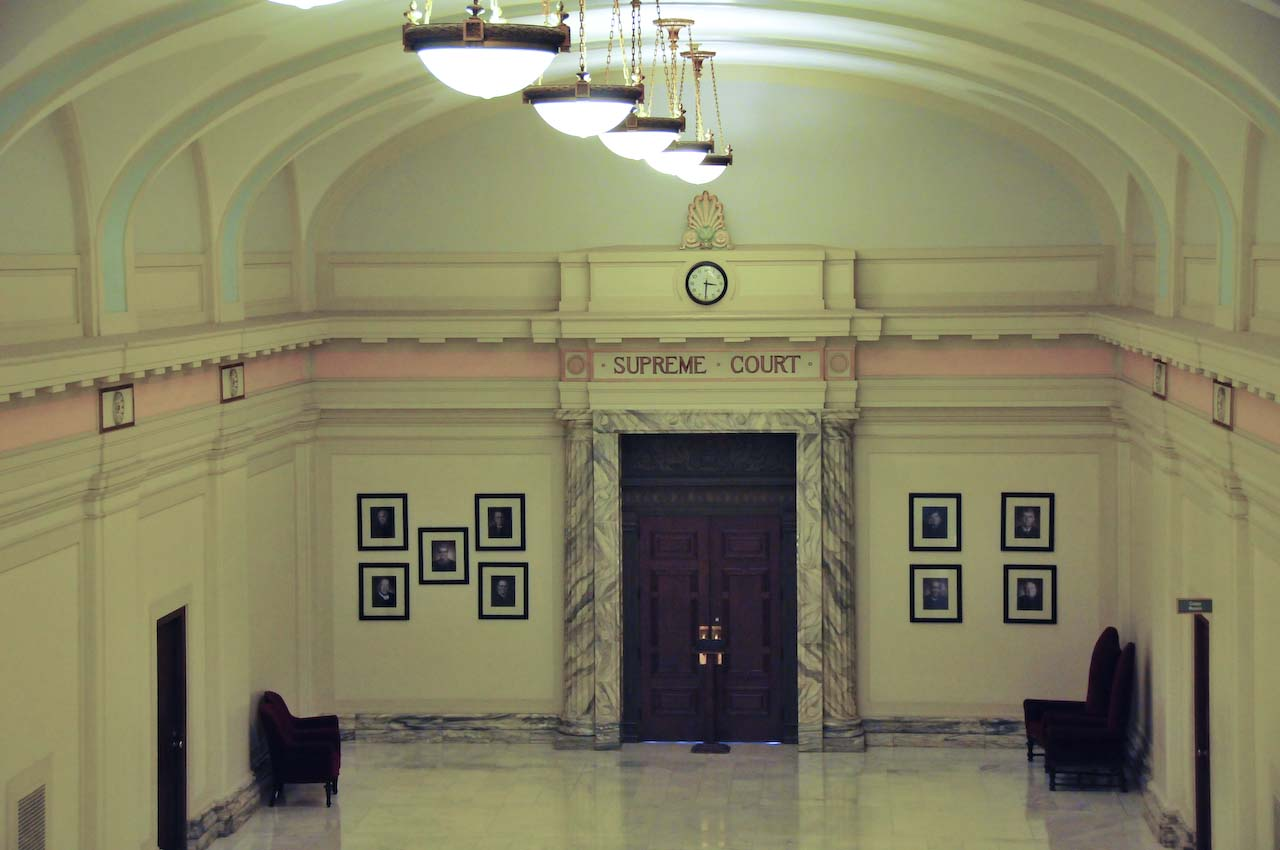 OKC Supreme Court Entrance